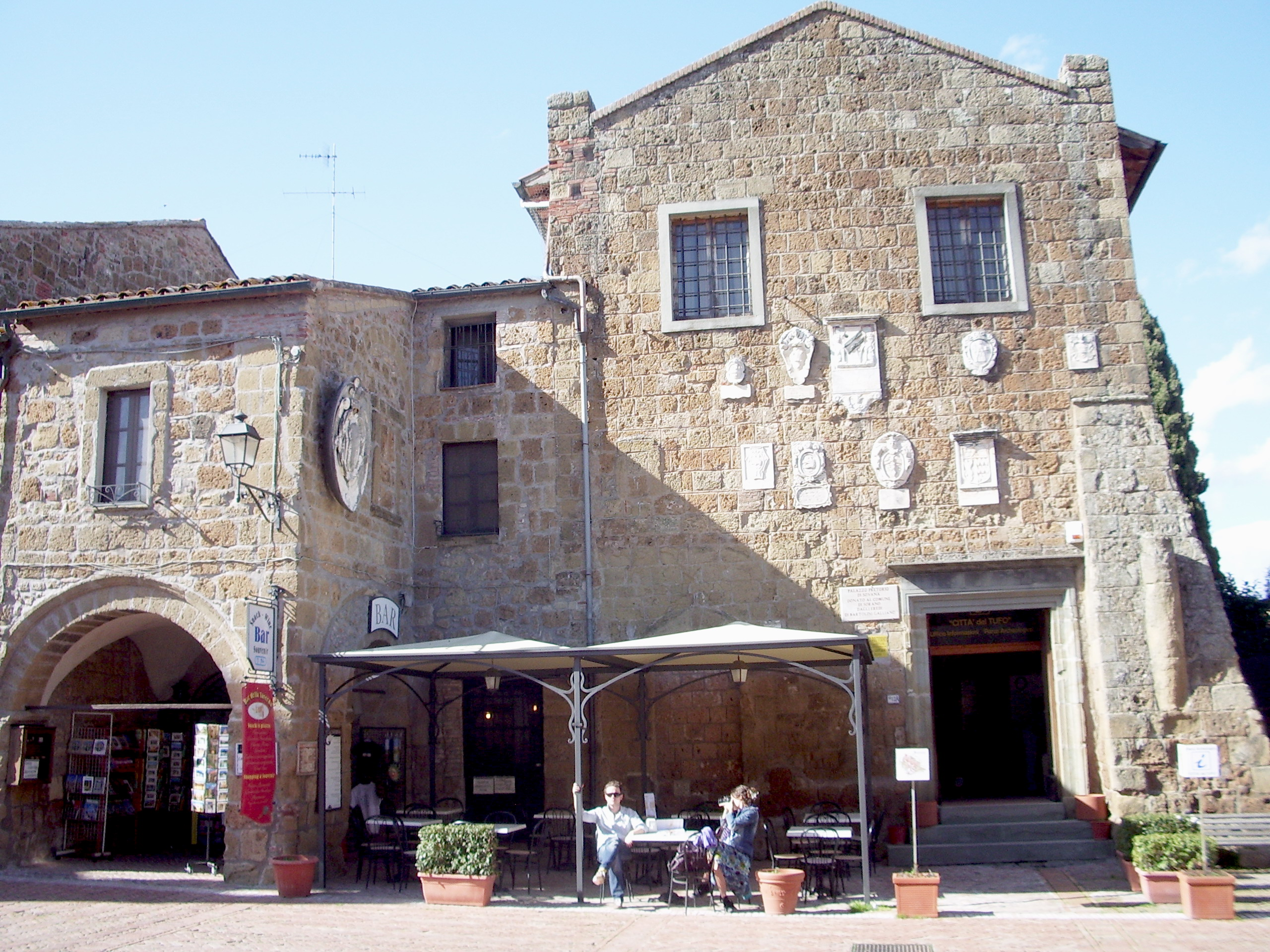 Il Palazzo Pretorio e la Loggetta del Capitano a Sovana